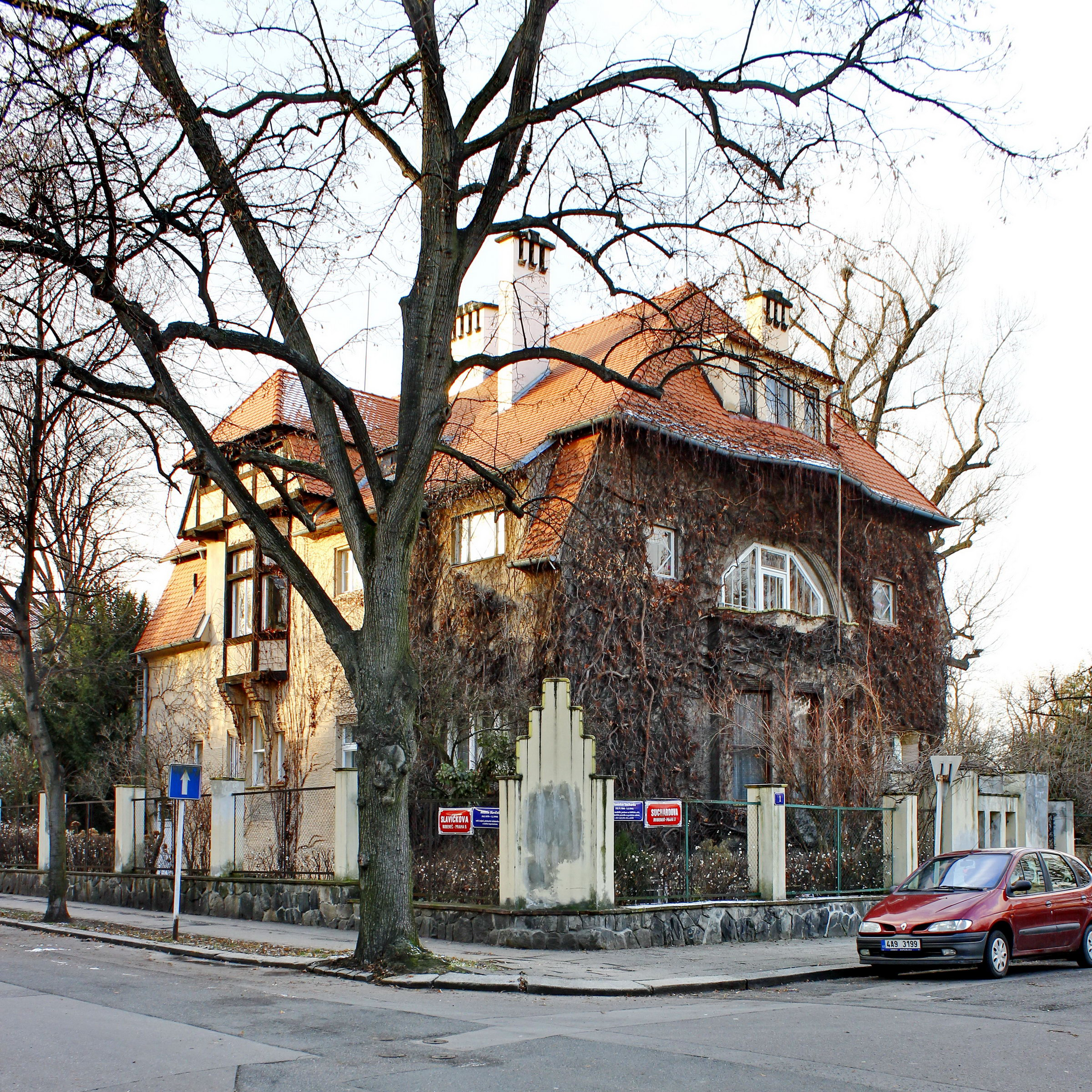 Jan Kotěra: Vila sochaře Stanislava Suchardy (1904-1907), Praha 6 - Bubeneč, č. p. 248, Slavíčkova 6